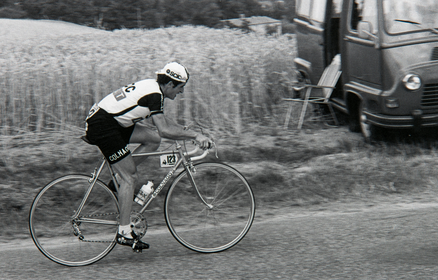 Luciano Conati durant le Tour de France 1976. Photographie : René Milanese